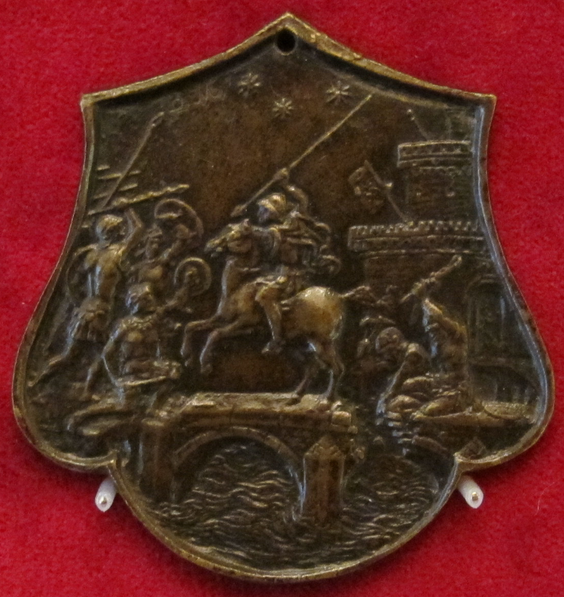 Monogrammista IO.F.F., italia del nord, orazio coclite, fine del XV sec